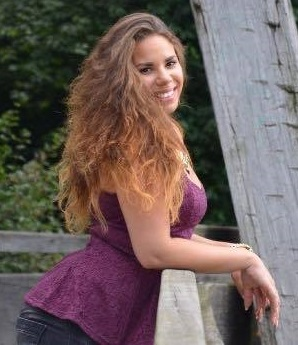 Das Bild zeigt die Schauspielerin Lidia Delgado Fortes